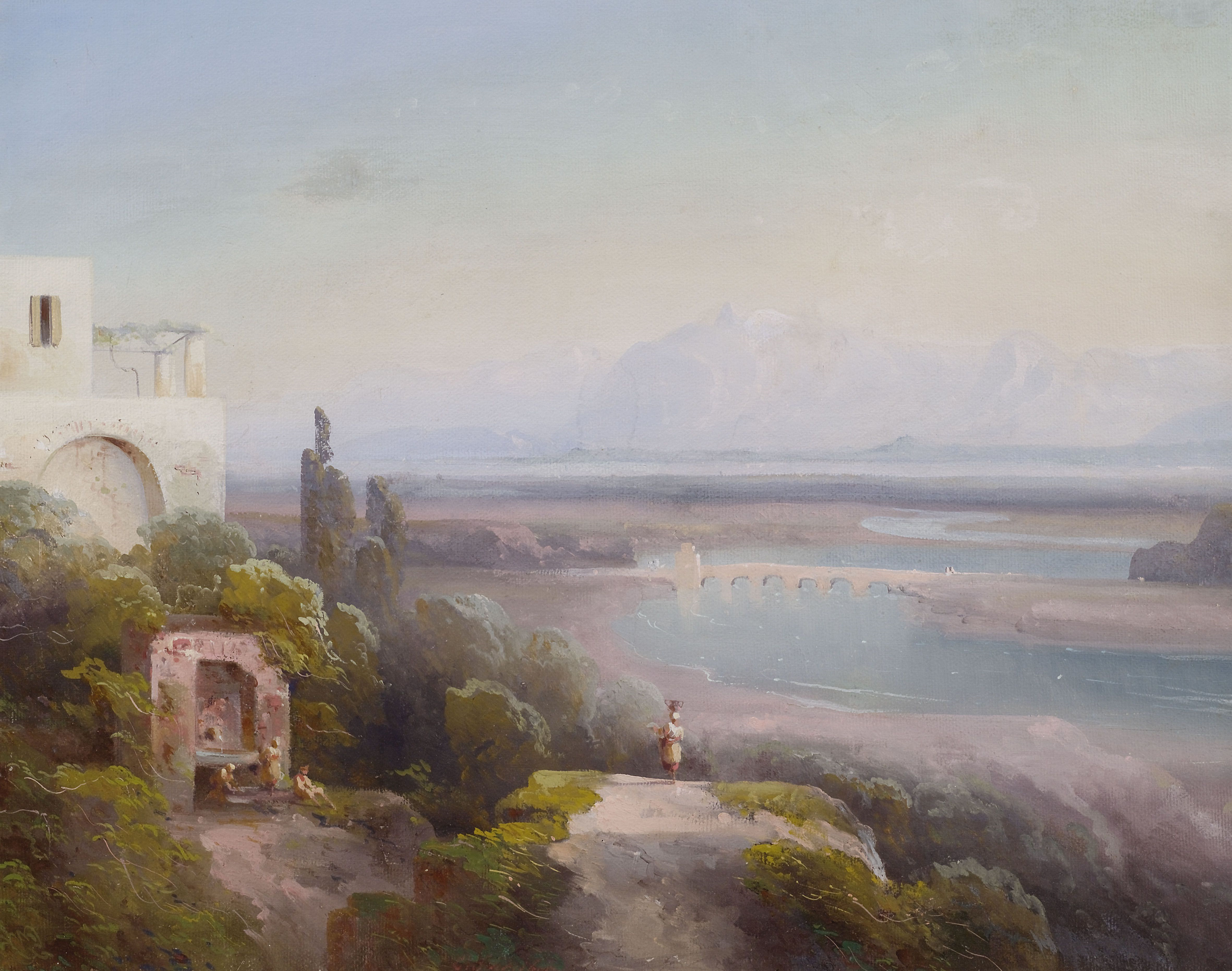 Süditalienische Landschaft. Gouache auf Papier. 46 x 58 cm